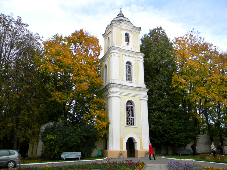 Нясвіж. Былы кляштар бенедыкцінак